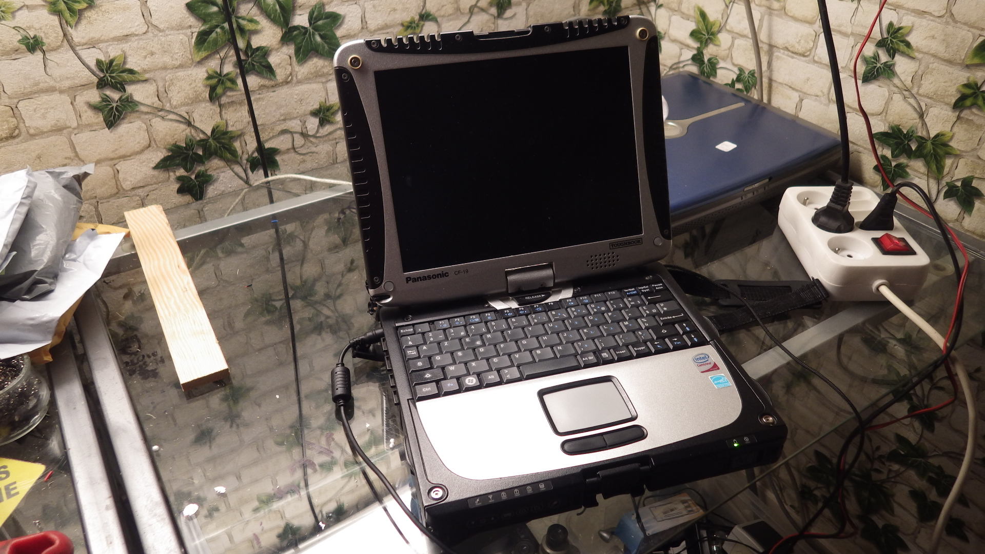 It's my toughbook as an illustration for the Toughbook article on